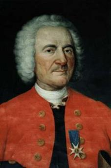 Amédée François Frézier (1682-1773). From